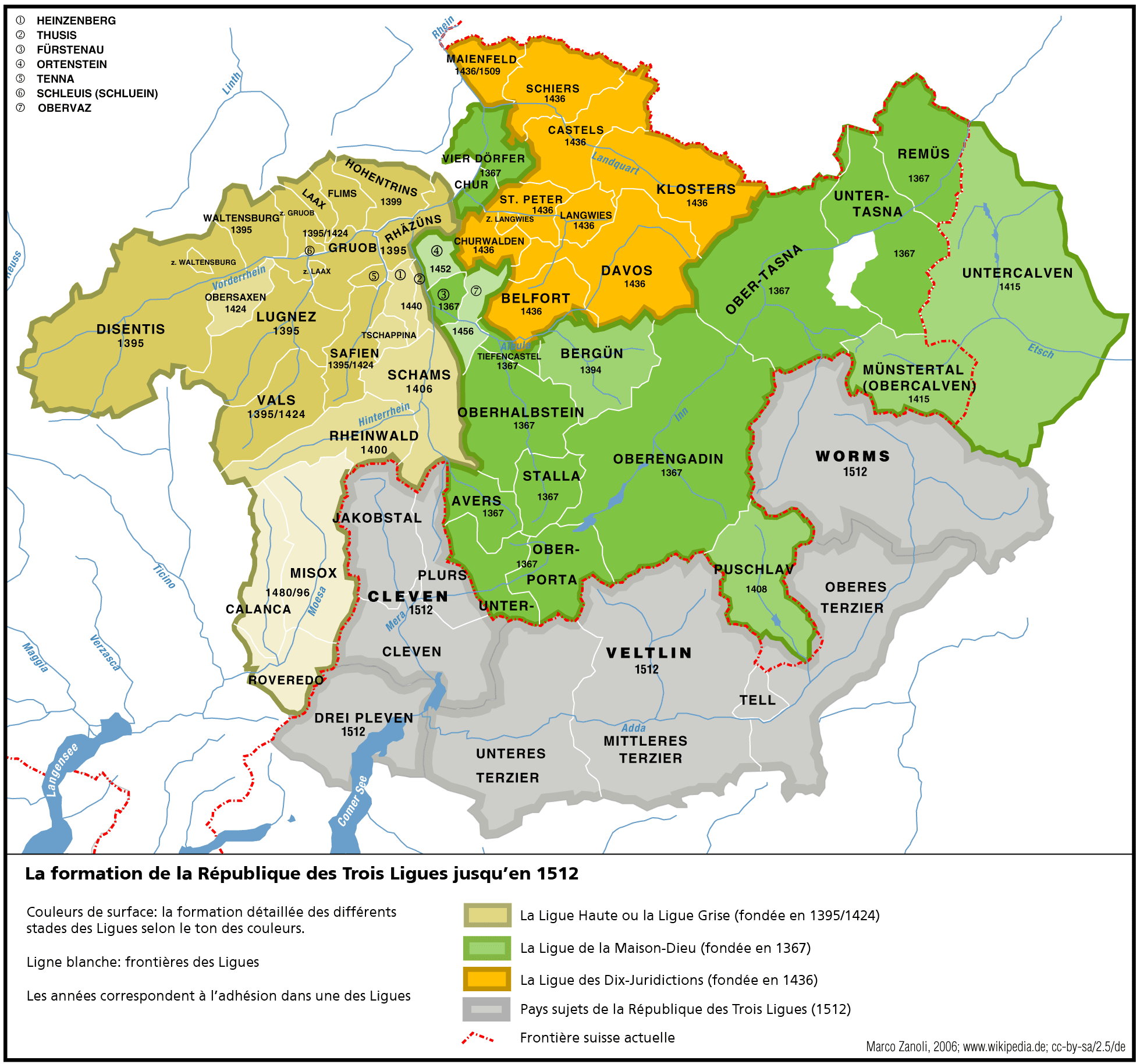 Die Entstehung des Freistaats der Drei Bünde bis 1512